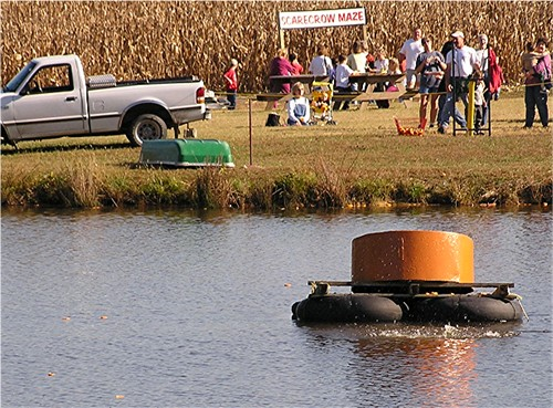 pompoenslingerbaan eigen foto